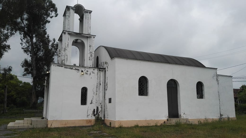 აძუბჟის ეკლესია